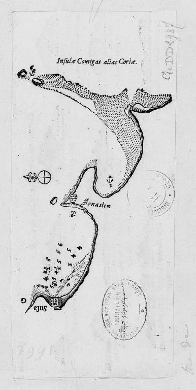 Carte italienne de Sousse, Monastir et des îles Kuriat, 1600-1699, Tunisie.